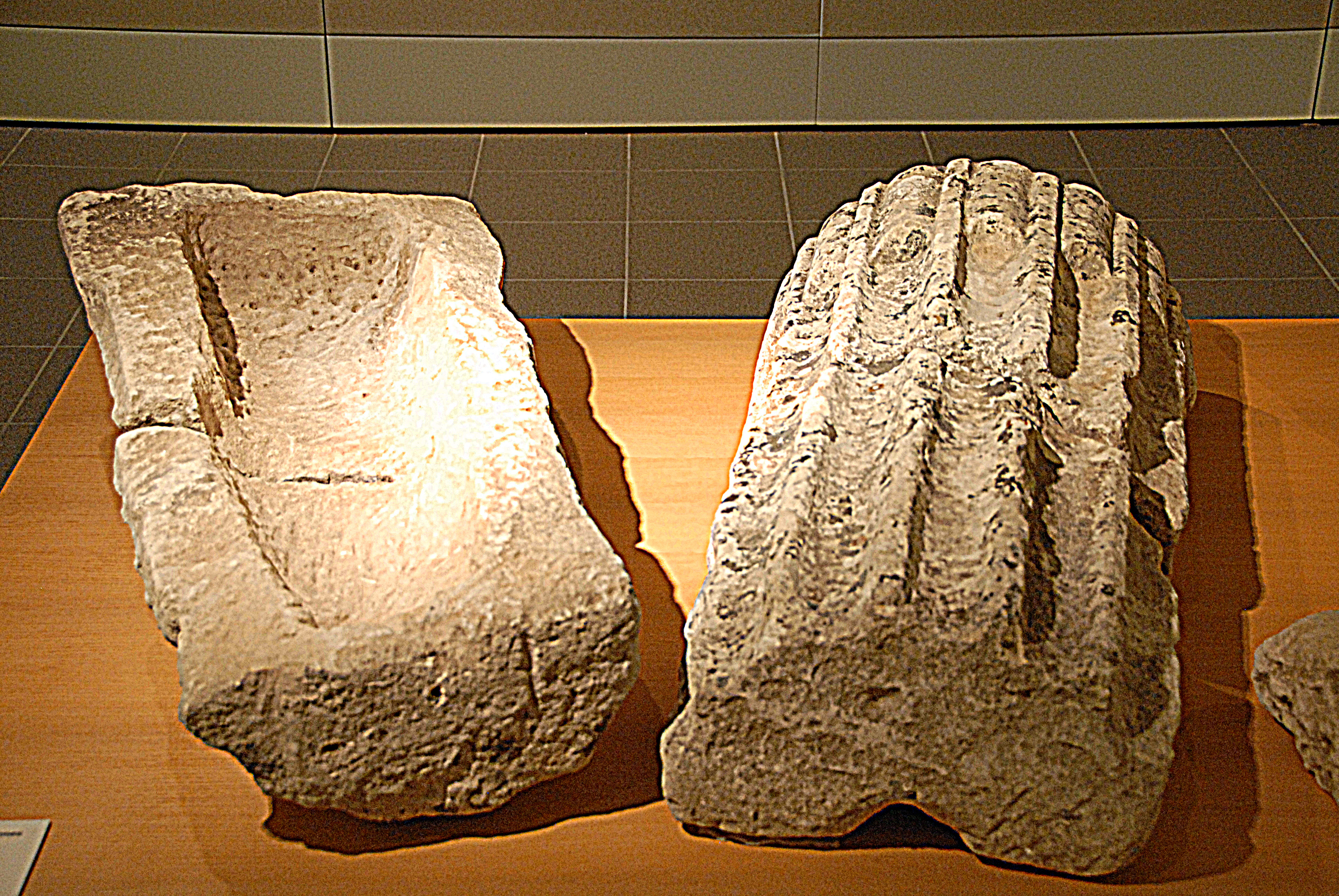 Civaux, Museum, Sarkophag aus röm. Säule